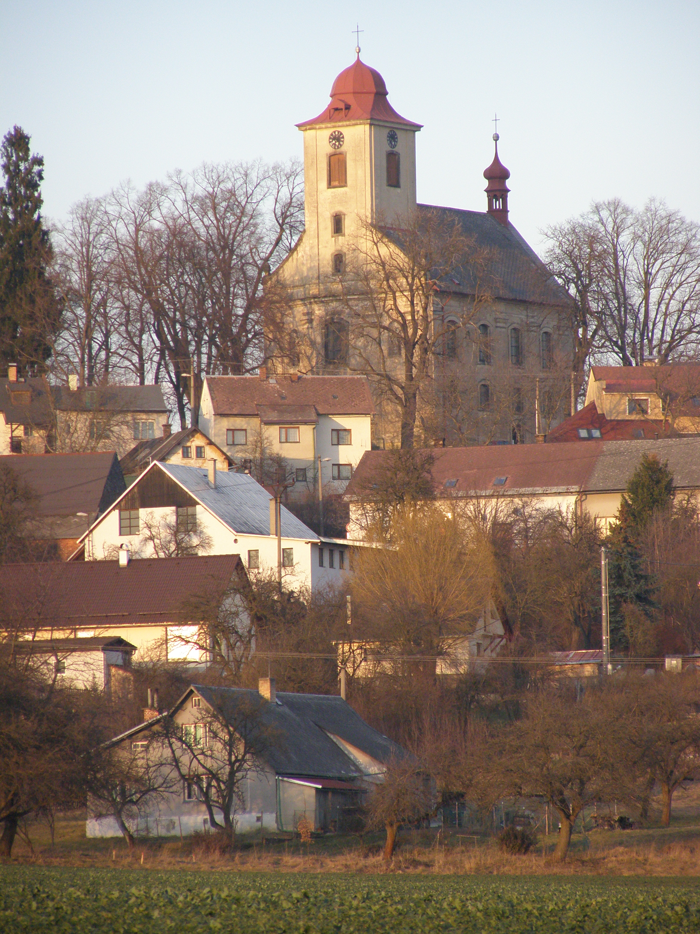 Kostel sv. Jiří – Jenišovice u Jablonce nad Nisou – pohled od Paceřic